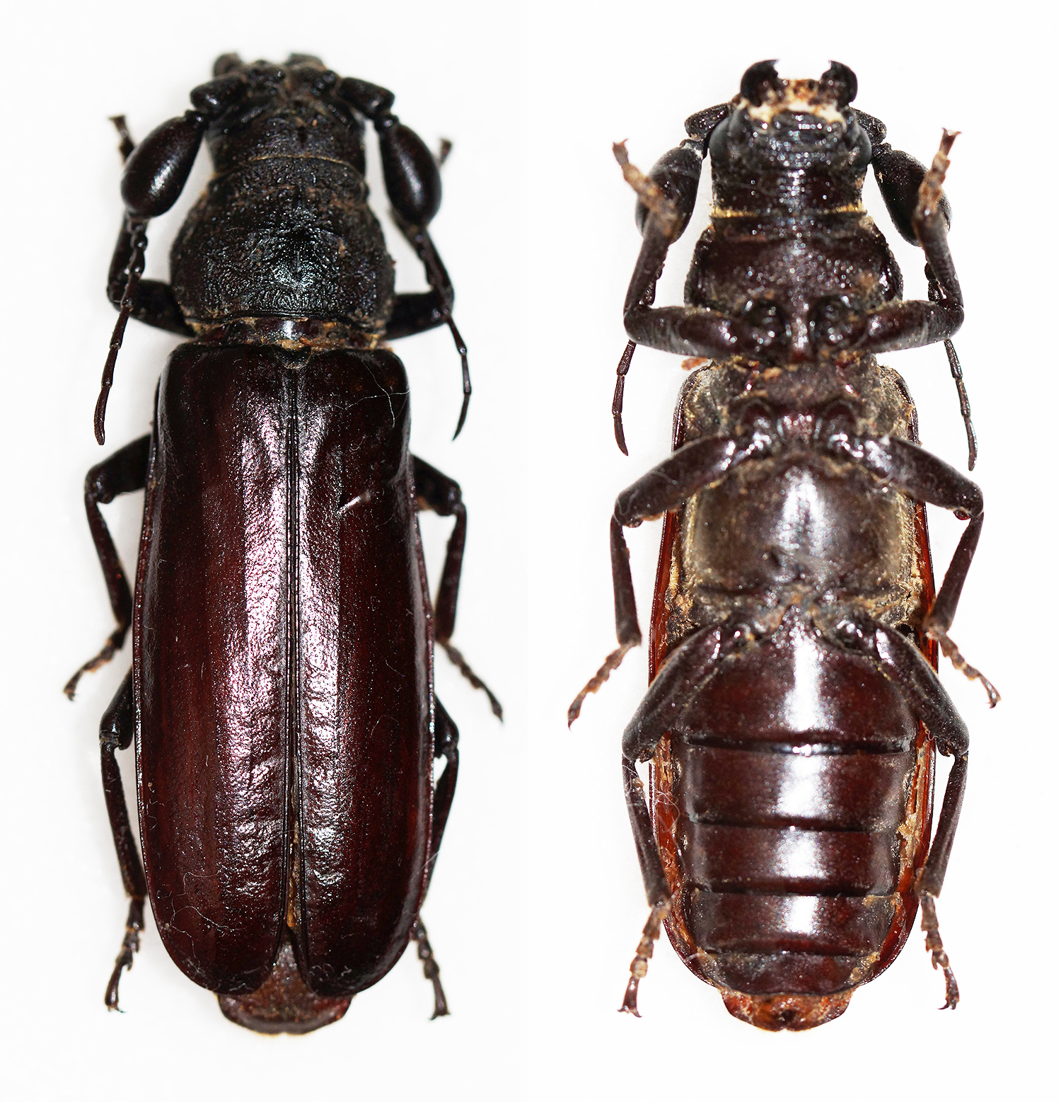 Bates1871 Sex: Male Data: 10-12-13 - Ulugura Mts - Tanzania Size: 52mm